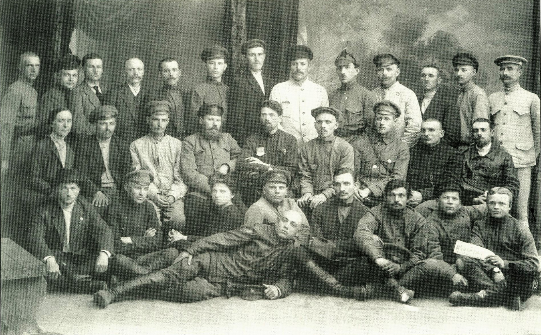 1917. Члены первого уездного исполкома Юзовки